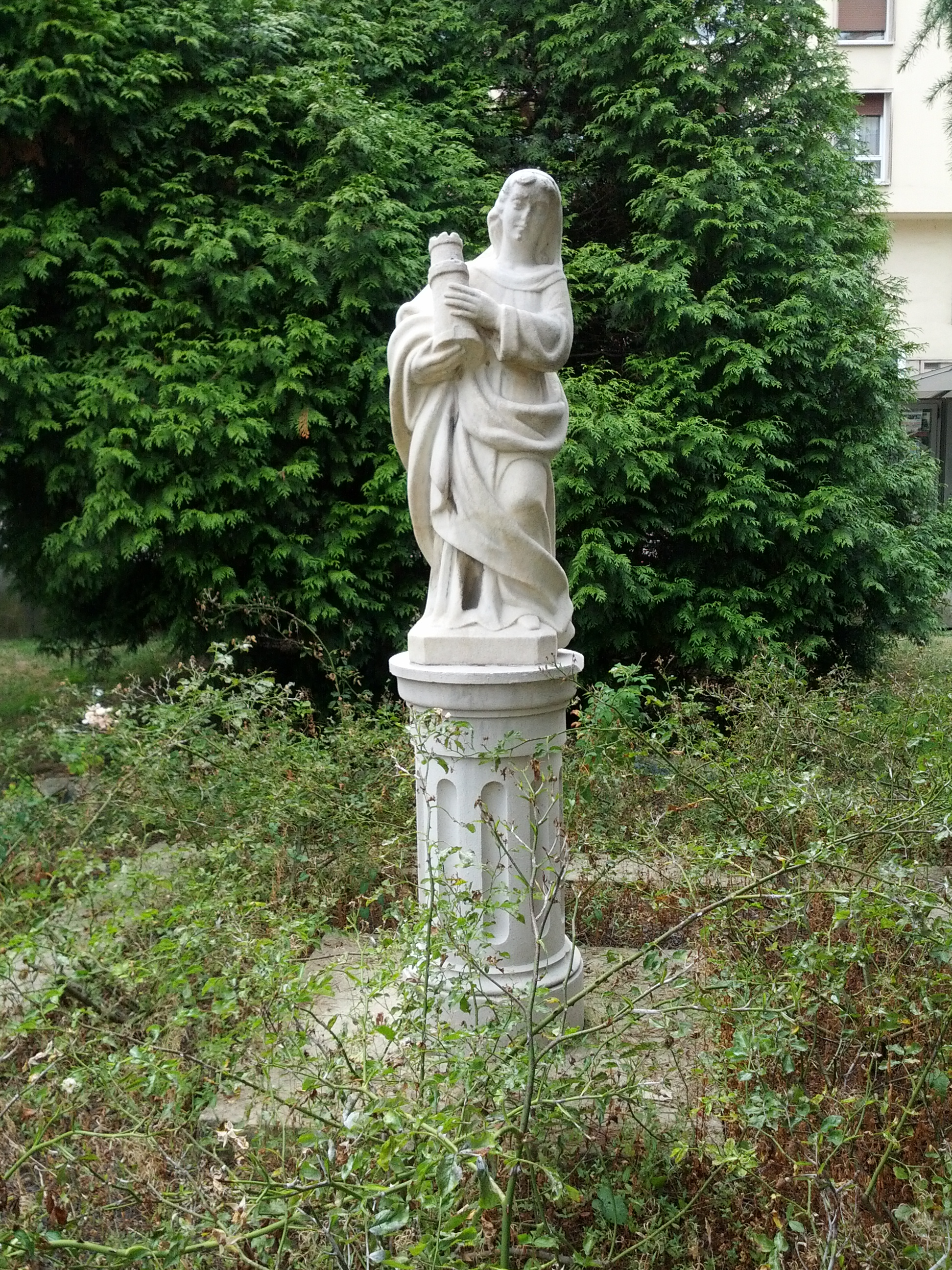 Imagen de Santa Bárbara en los jardines de la Escuela de Minas de Oviedo (España)